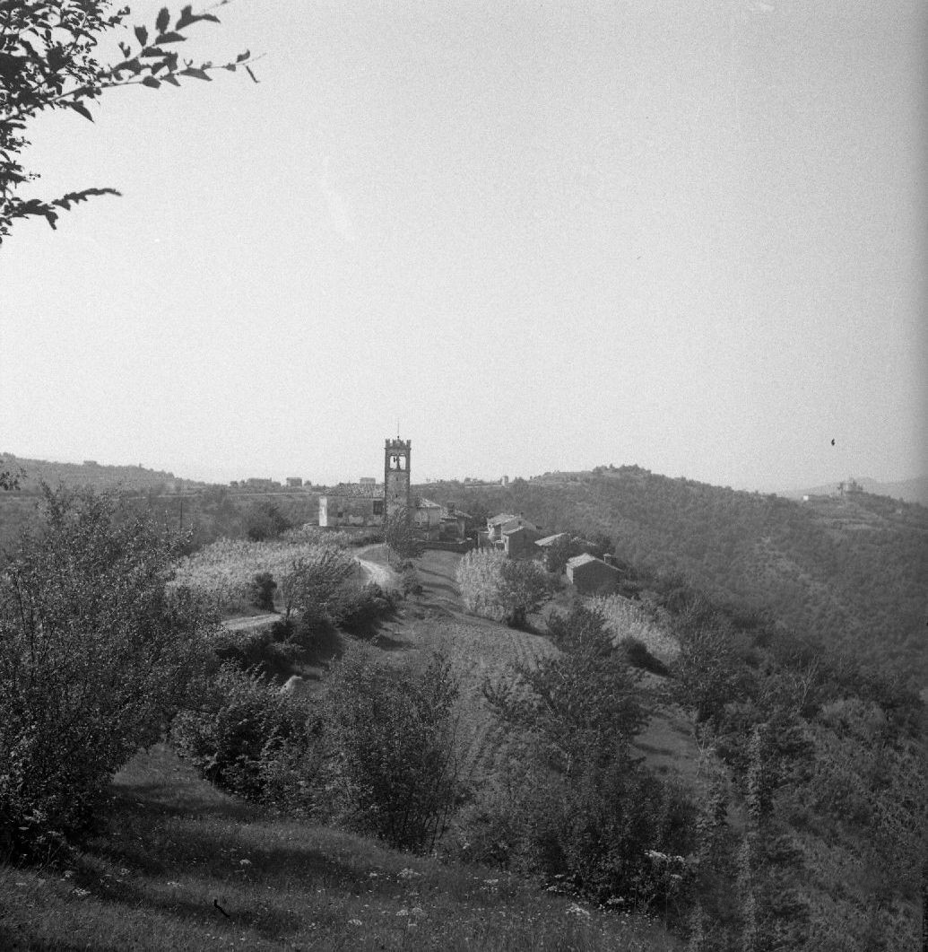 Krasno.